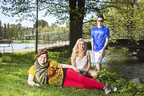 Koulutuskeskus Salpaus, kuva: Teemu Töyrylä